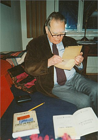 Czesław Miłosz (1911-2004), Polish writer (6, Boguslawskiego Str., Cracow, Poland, December 1998)